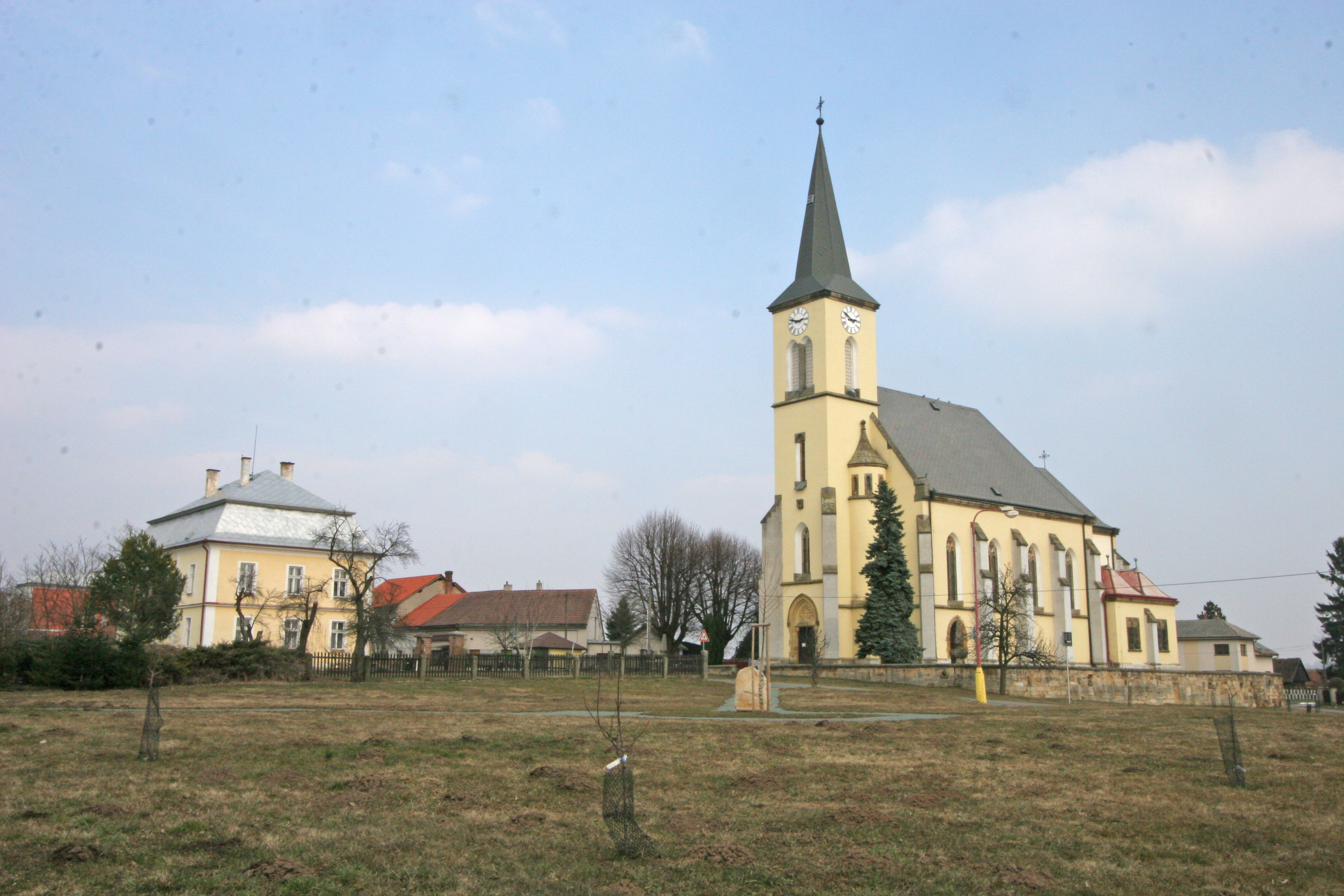 Dohalice - kostel sv. Jana Křtitele